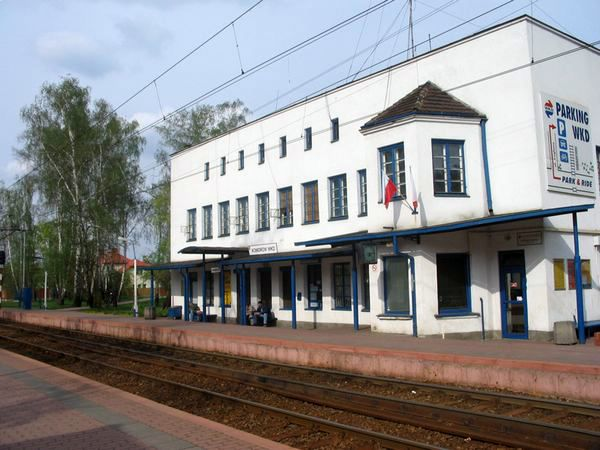 Stacja kolejki WKD w Komorowie